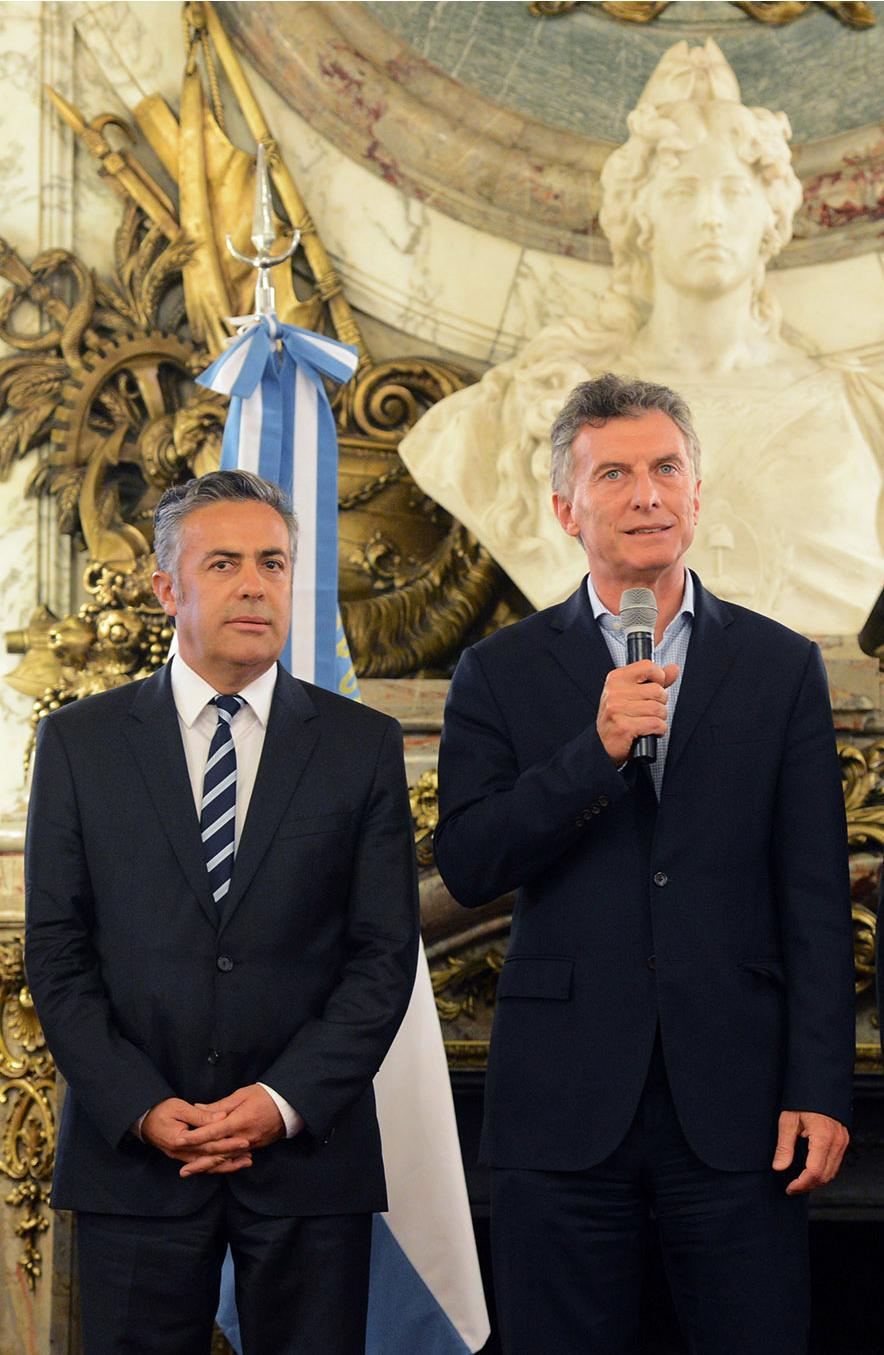 El presidente Mauricio Macri anunció hoy la construcción de una autovía de 160 kilómetros sobre la Ruta Nacional 40, entre las ciudades de Mendoza y San Juan, que reducirá sensiblemente el tiempo de viaje y mejorará la seguridad vial en ese tramo. “Estamos poniendo en marcha una iniciativa que le va cambiar la vida a miles y miles de personas que transitan la Ruta 40, entre el Aeropuerto de Mendoza y la circunvalación de la Ciudad de San Juan”, puntualizó Macri al hacer el anuncio en Casa de Gobierno. Lo acompañaron, los ministros de Transporte de la Nación, Guillermo Dietrich, y de Interior, Rogelio Frigerio, y los gobernadores de San Juan, Sergio Uñac, y de Mendoza, Alfredo Cornejo.